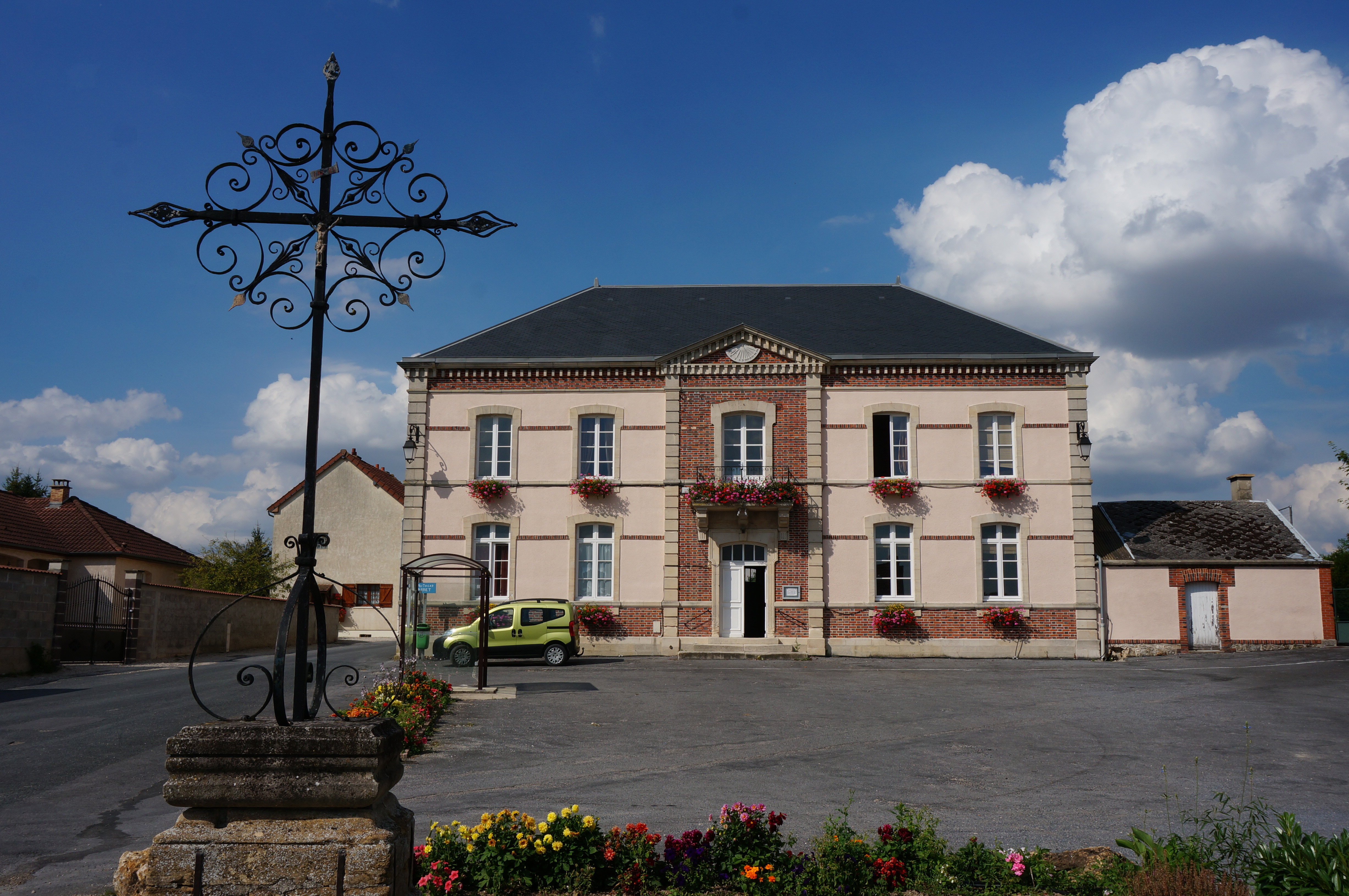 Mairie_de Vraux, sa place et une croix de chemin.